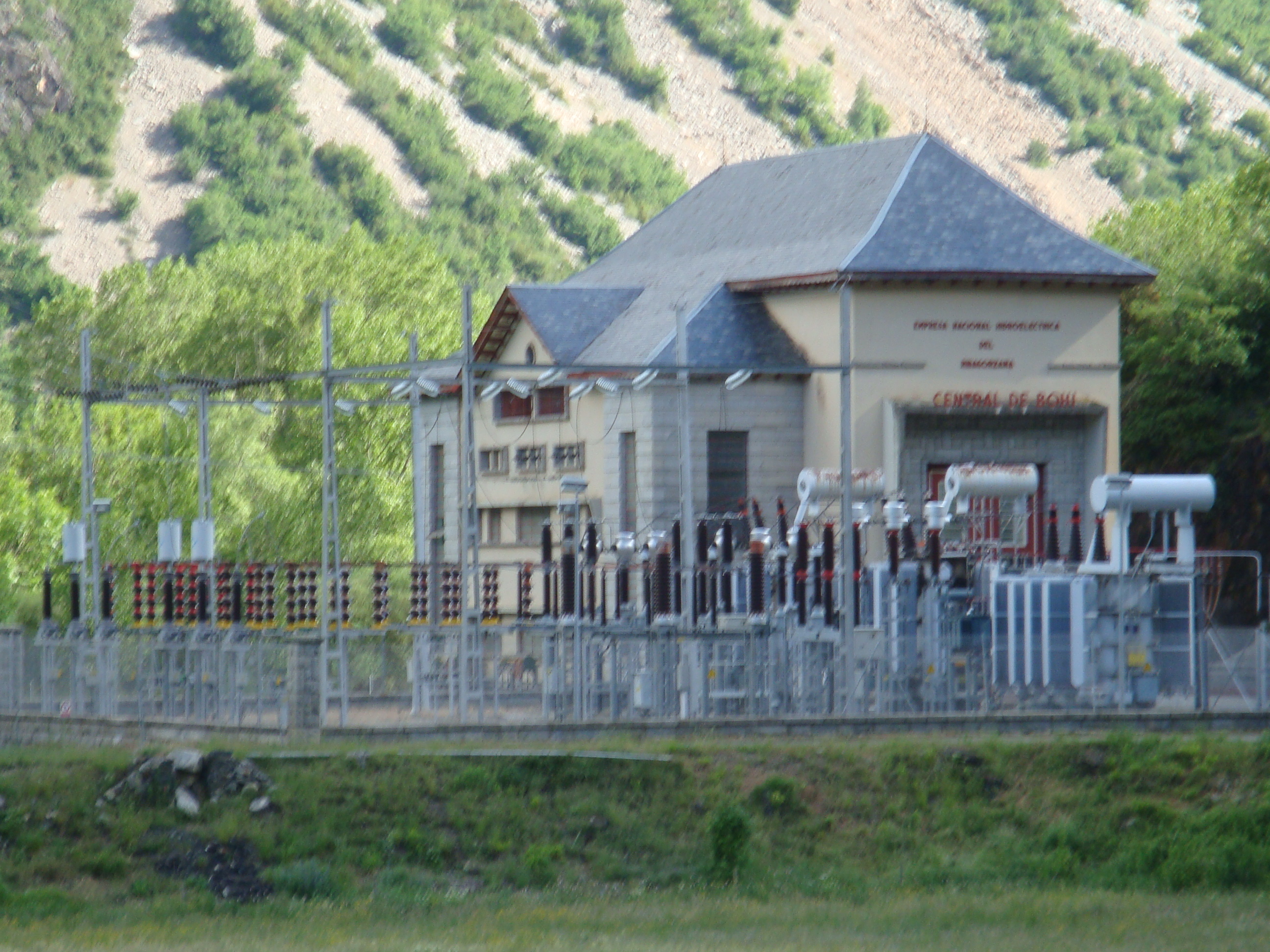 Cental eléctrica de Barruera (Lérida) España